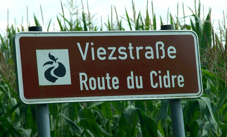 Beschilderungstafel Viezstrasse